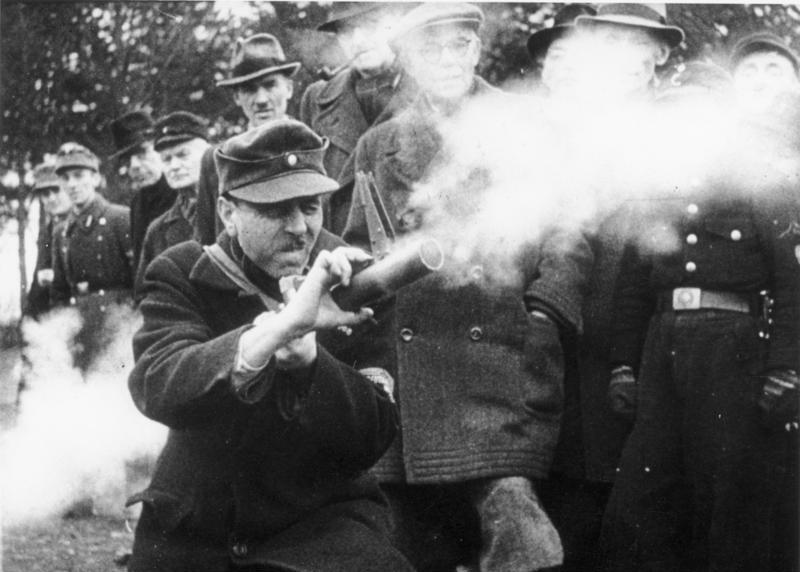 Volkssturm beim Übungsschießen mit der Panzerfaust in einer deutschen Stadt, Anfang März 1945